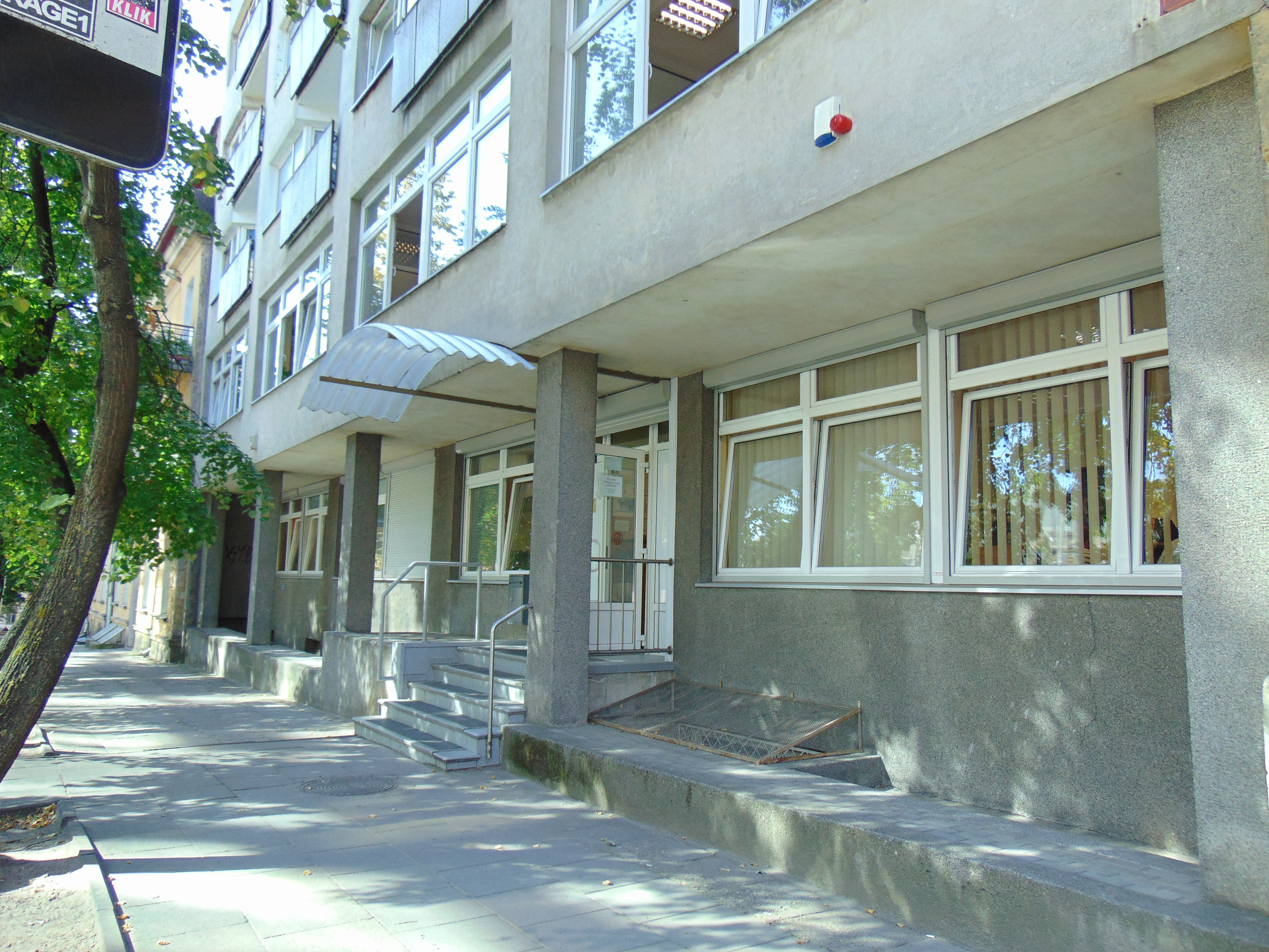 Gyventojų registro tarnyba